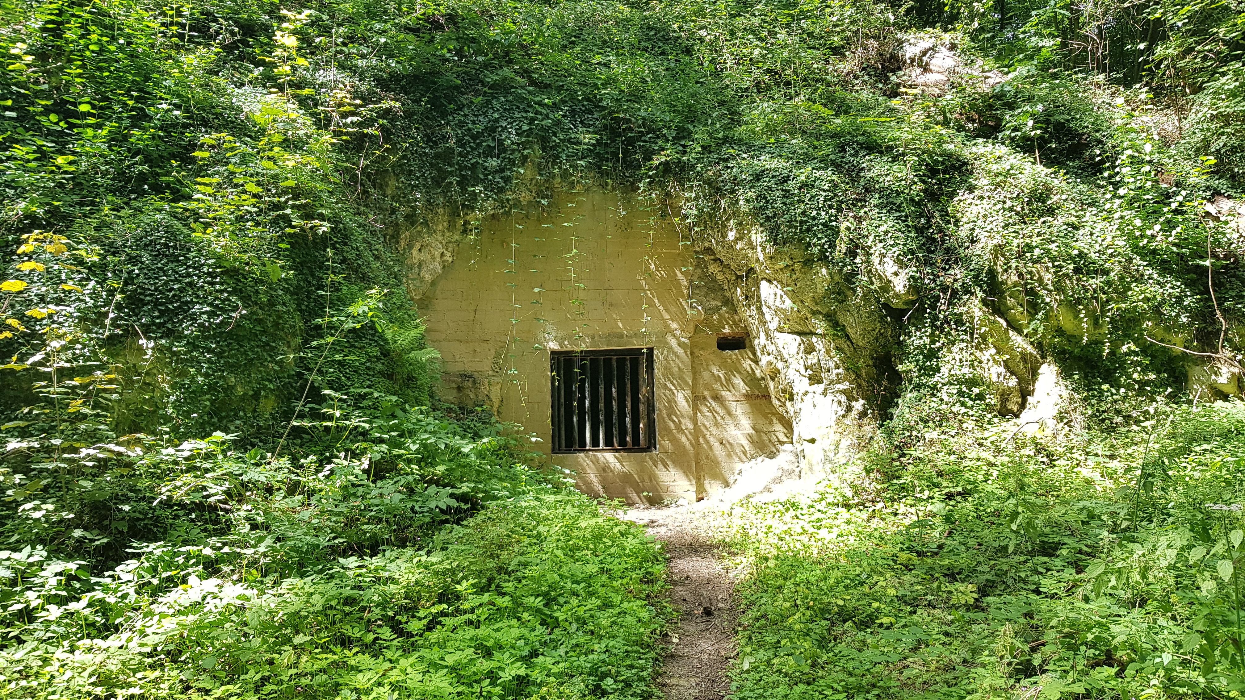 Slangenberggroeve, Geulhem, Nederland